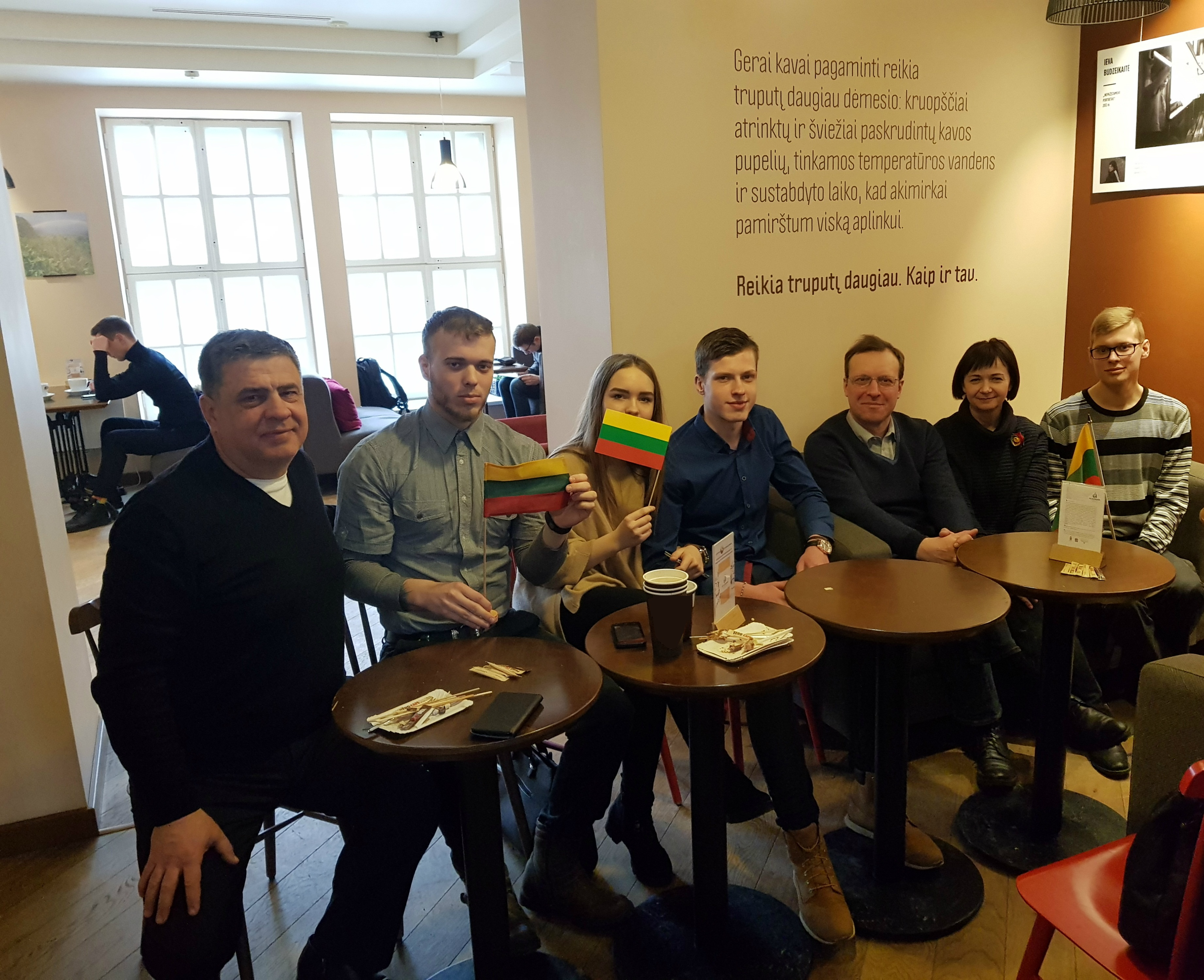 Dalis Lietuvos centro partijos atstovų Vasario 16–osios minėjime, 2018 metais, Klaipėdoje: Jaunųjų centristų pirmininkas Liutauras Barčkus (pirmas iš dešinės), Lietuvos centro partijos pirmininkas, Seimo narys Naglis Puteikis su žmona Nina, Jaunųjų centristų pirmininko padėjėjas Titas Klimas, Livija Petrauskaitė, Jaunųjų centristų Tarybos narys Tadas Vismantas, Lietuvos centro Valdybos partijos pirmininkas Alvidas Šimkus (pirmas iš kairės).